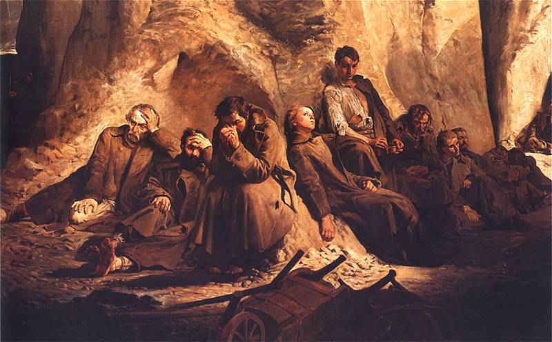 Jacek Malczewski (1854-1929) – polski malarz symbolista.